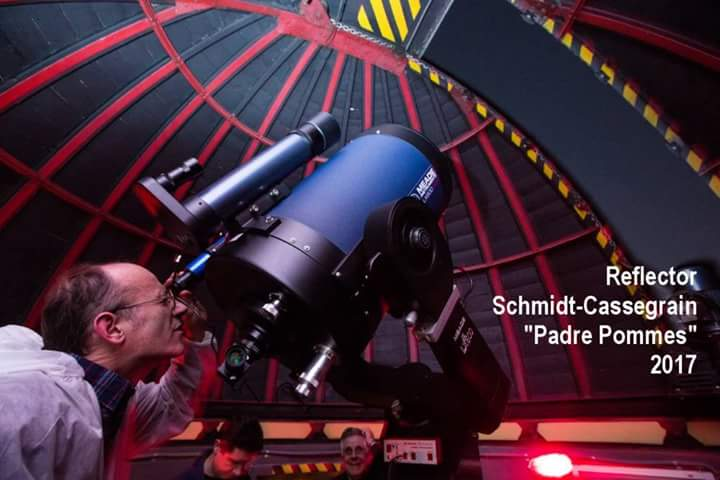 Meade Lx600 - Reflector Schmidt-Cassagrain elemento principal del Observatorio San Jose